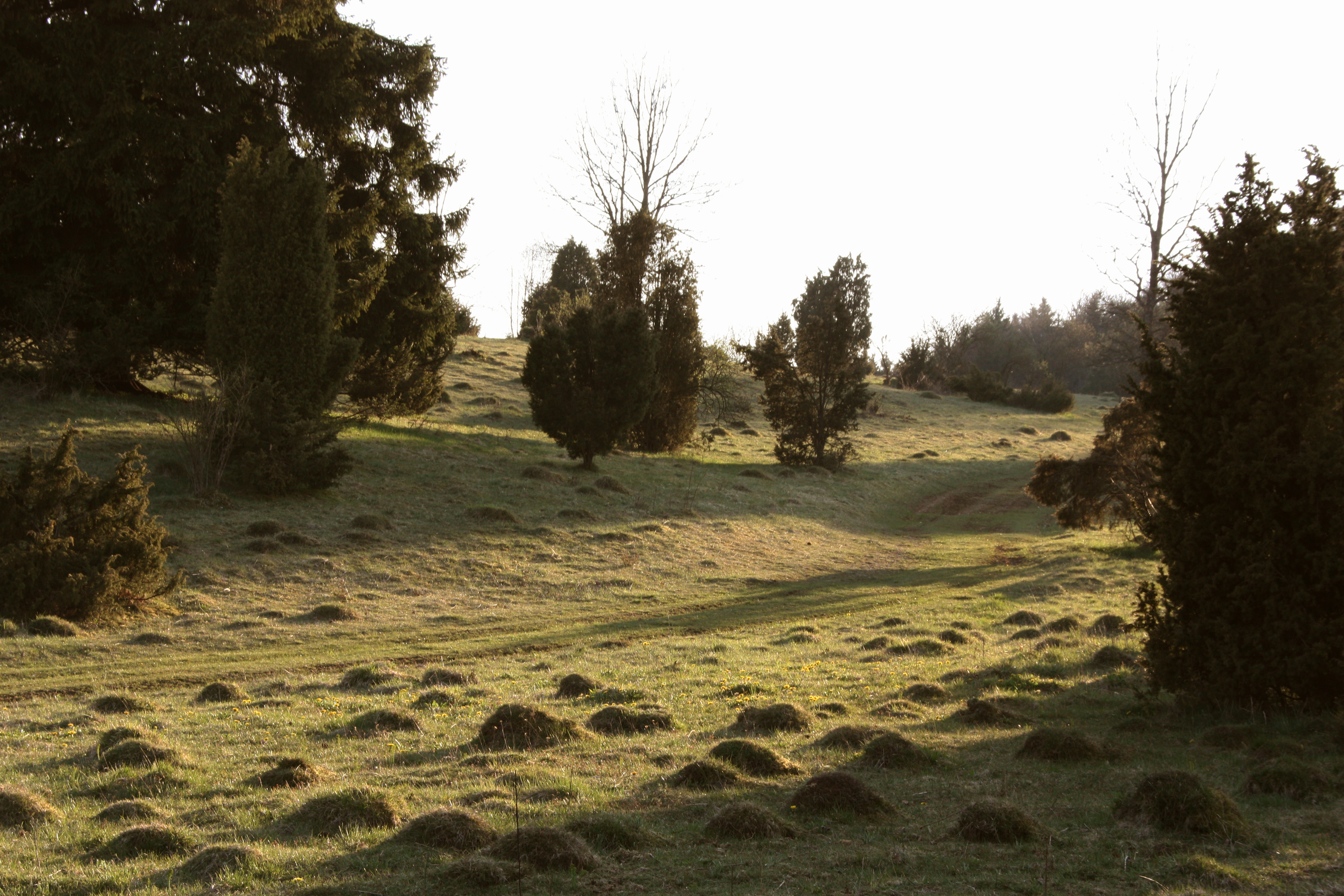 (NSG:BW-1.023)_Dellenhäule, Blick über die Wacholderheide und Ameisenstadt